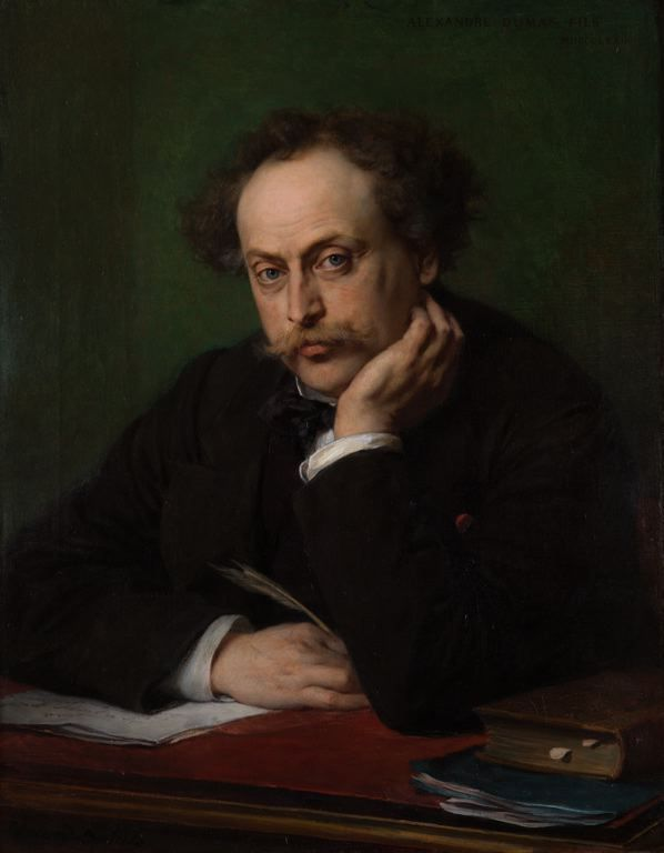 Huile sur toile - 79 x 62,5 cm